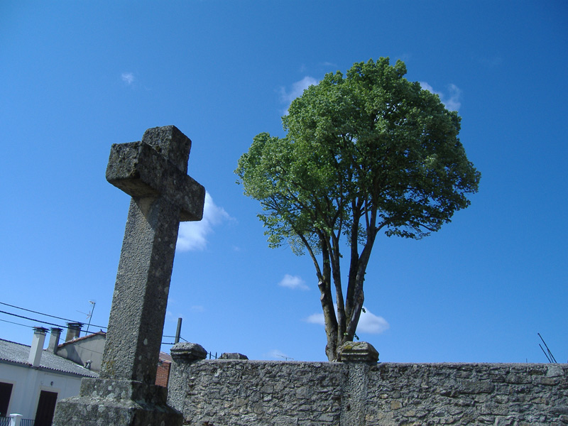 El Tilero símbolo de Navafrías se encuentra a su entrada